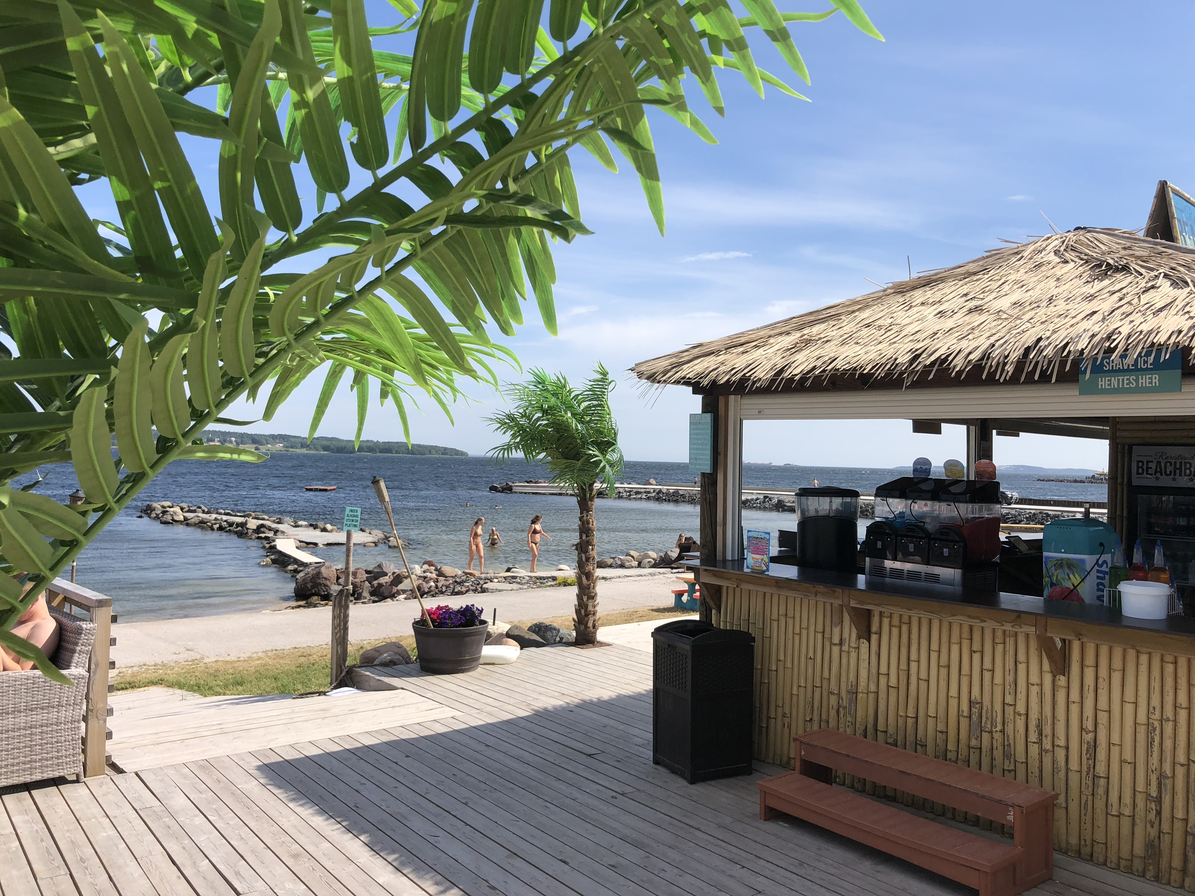 Sydenstemning